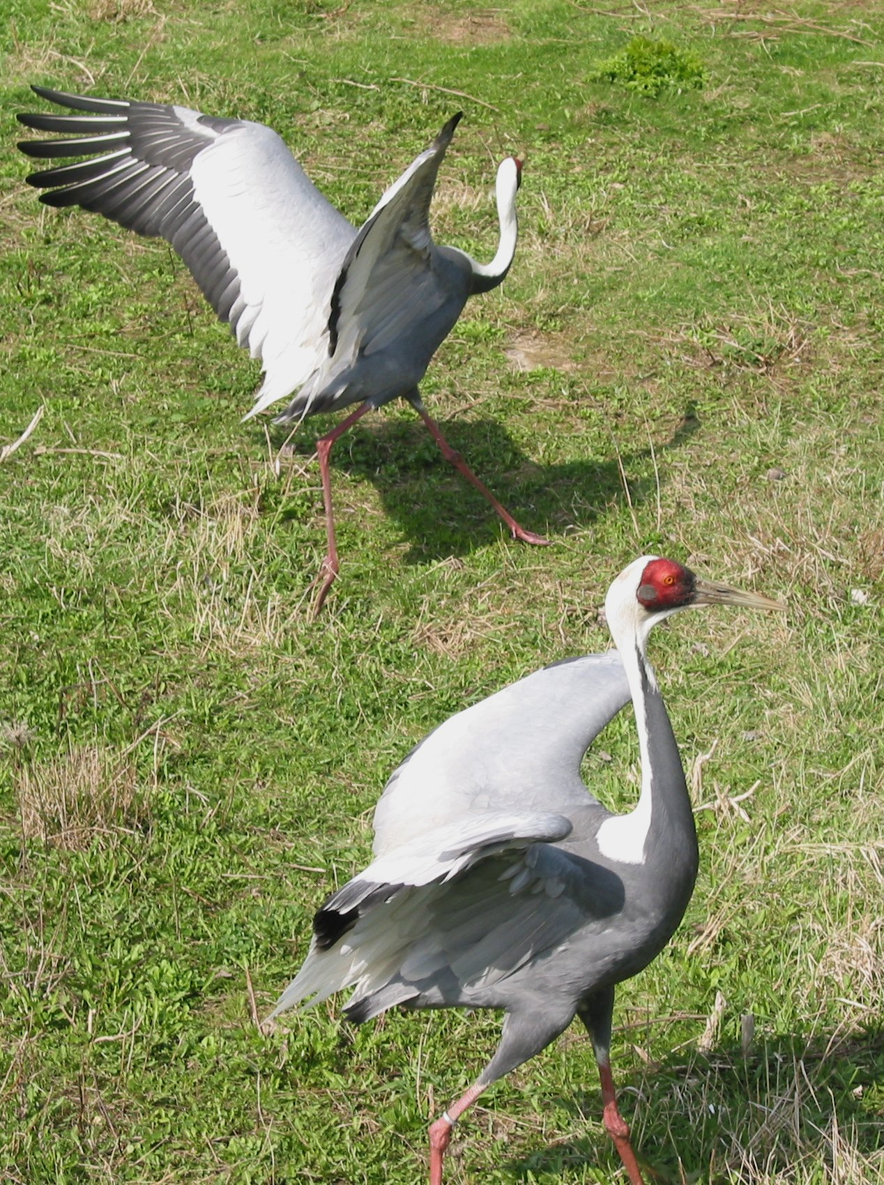 Grus vipio, 2 birds, Prague zoo